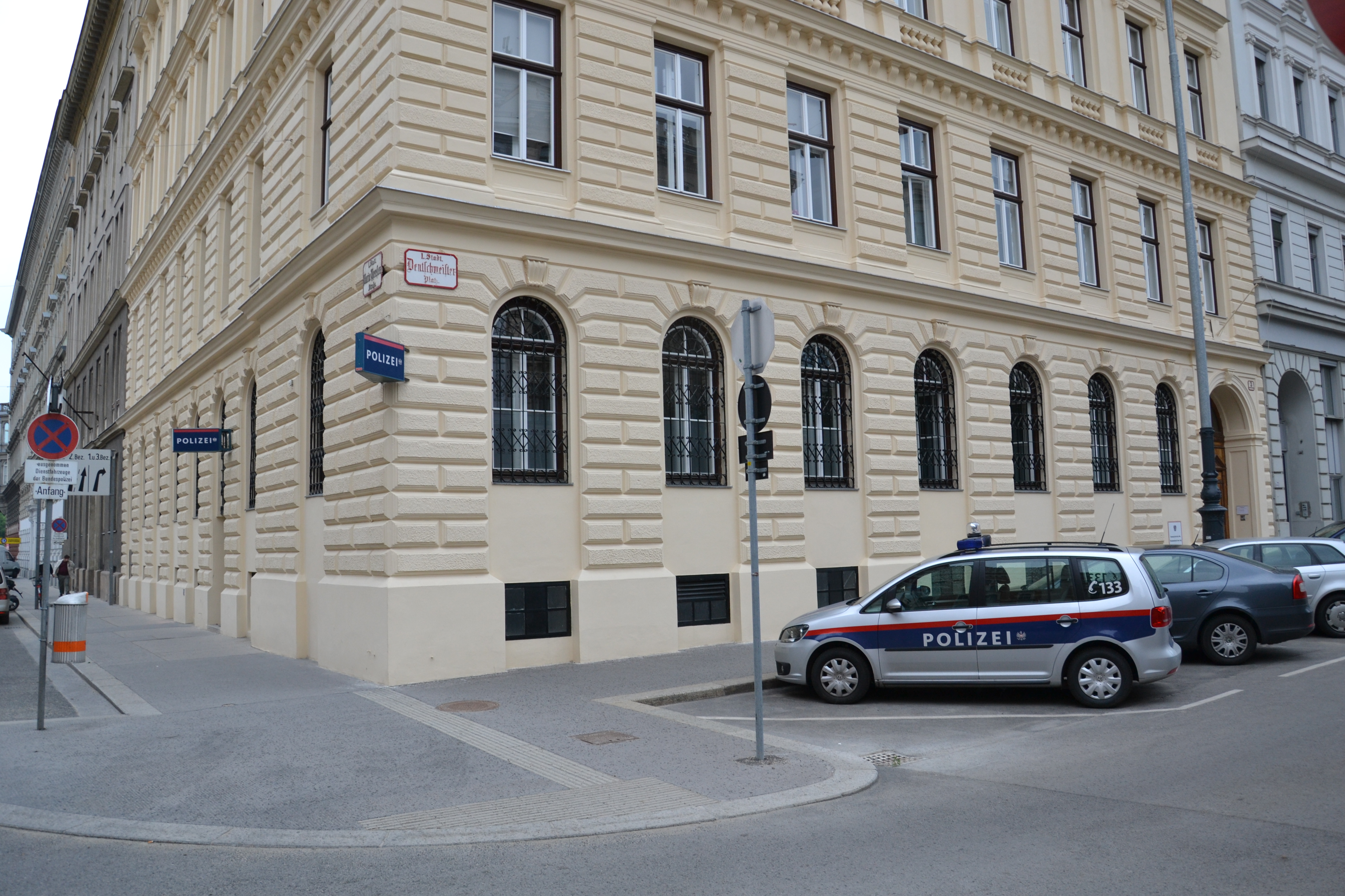 Polizeikommissariat Innere StadtStadtpolizeikommando Innere StadtPolizeiinspektion DeutschmeisterplatzDeutschmeisterplatz 31010 Wien